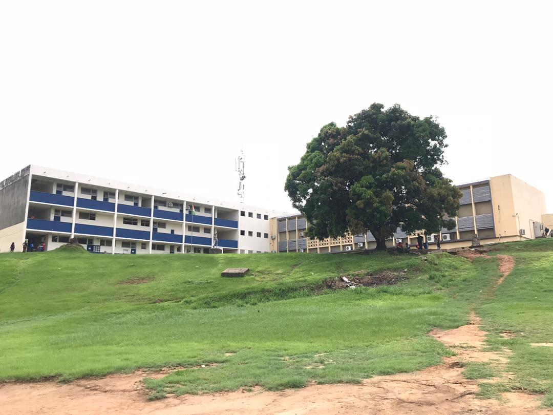 batiments de l'insaac